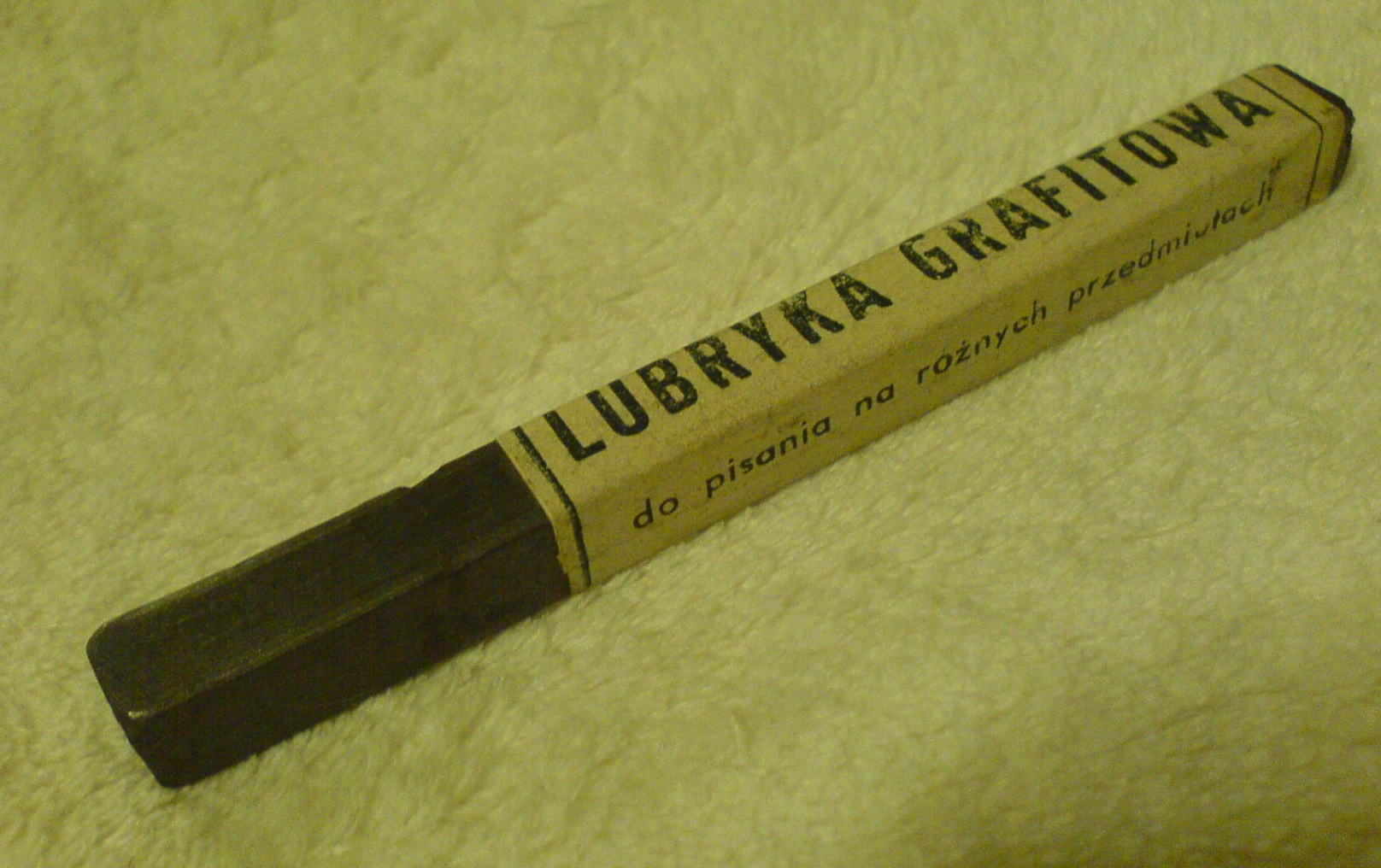 lubryka grafitowa